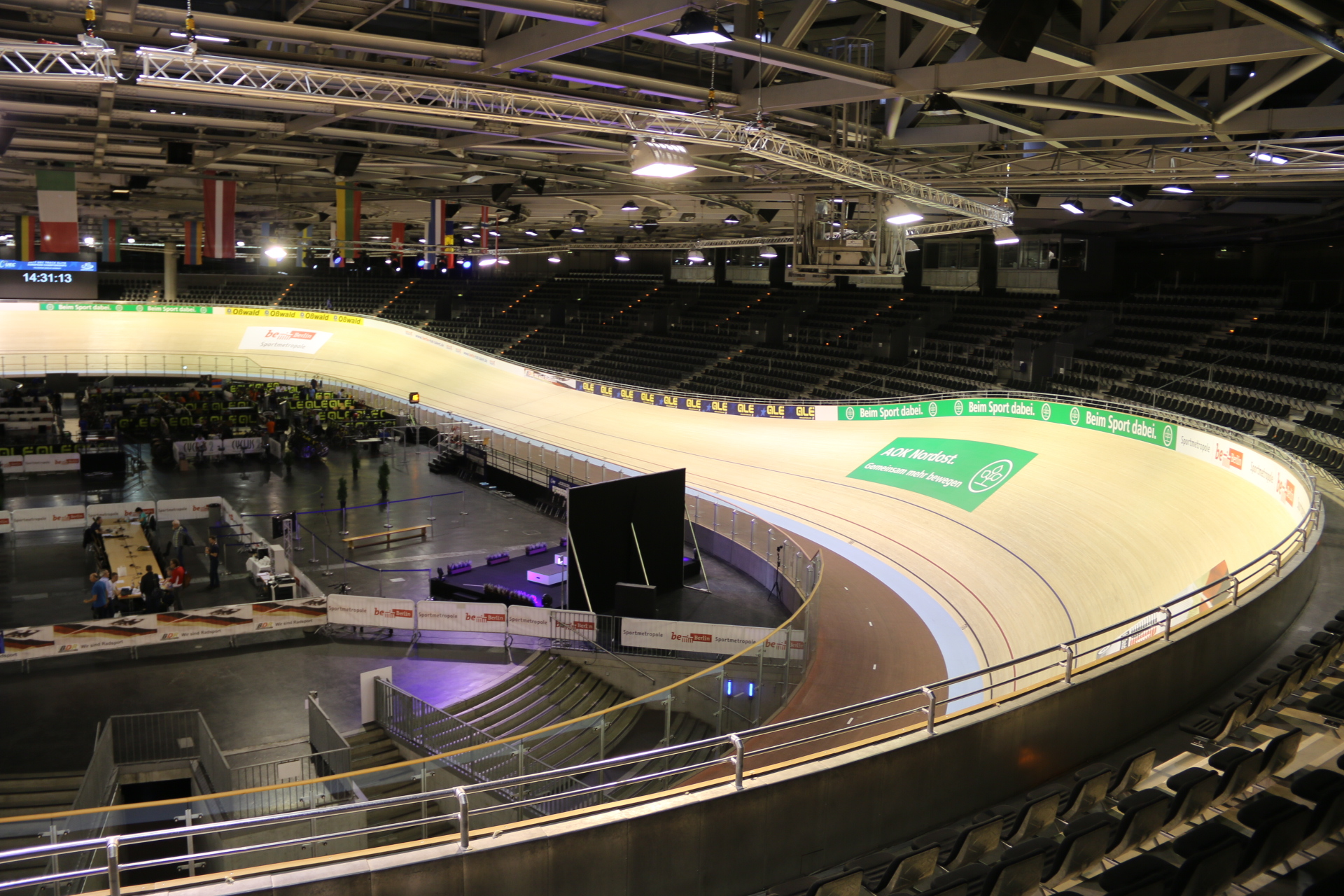 Innenraum Velodrom Berlin